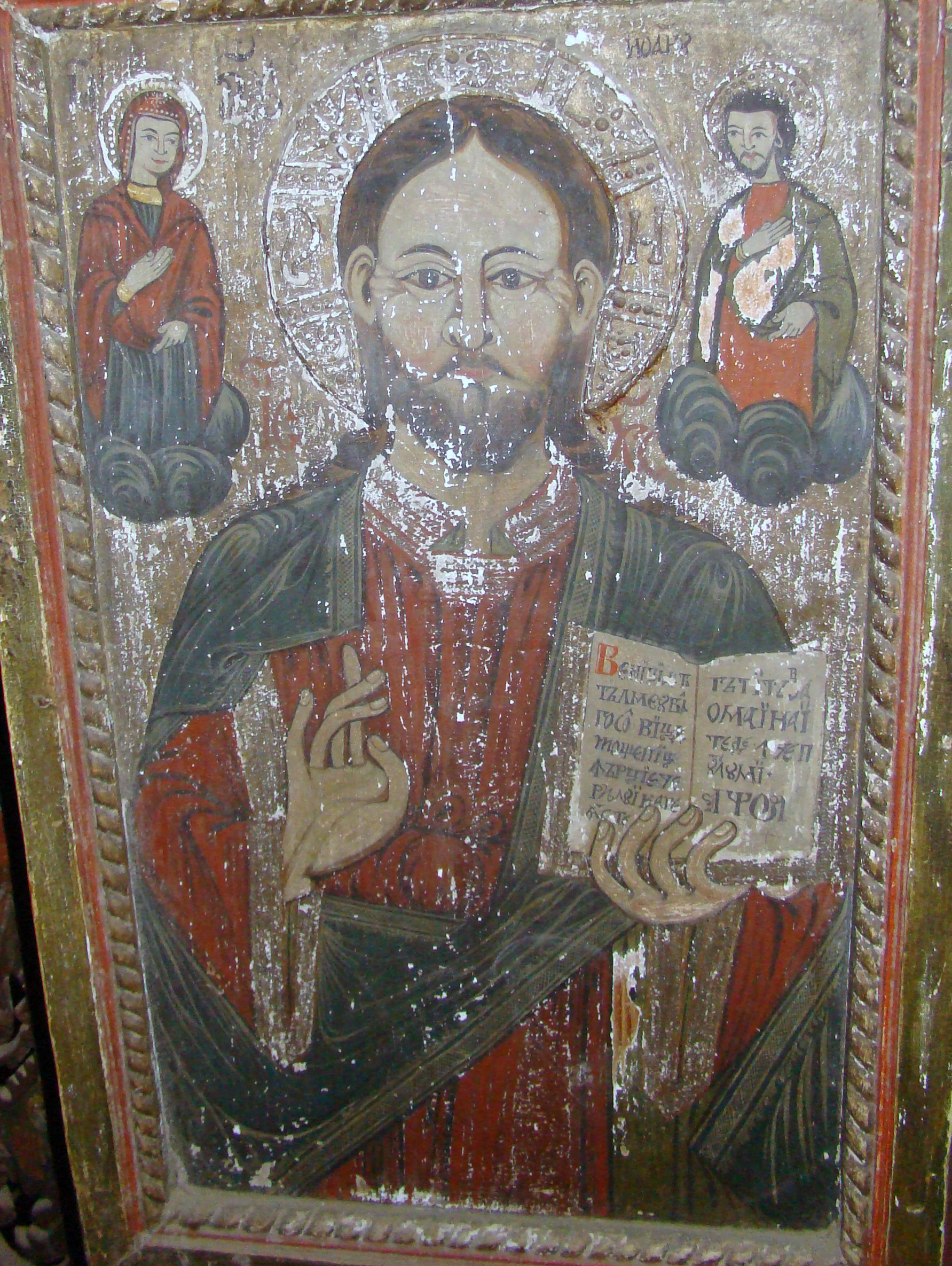 Iisus binecuvântând. Biserica de lemn „Sfinții Arhangheli Mihail și Gavriil" din Derșida, județul Sălaj